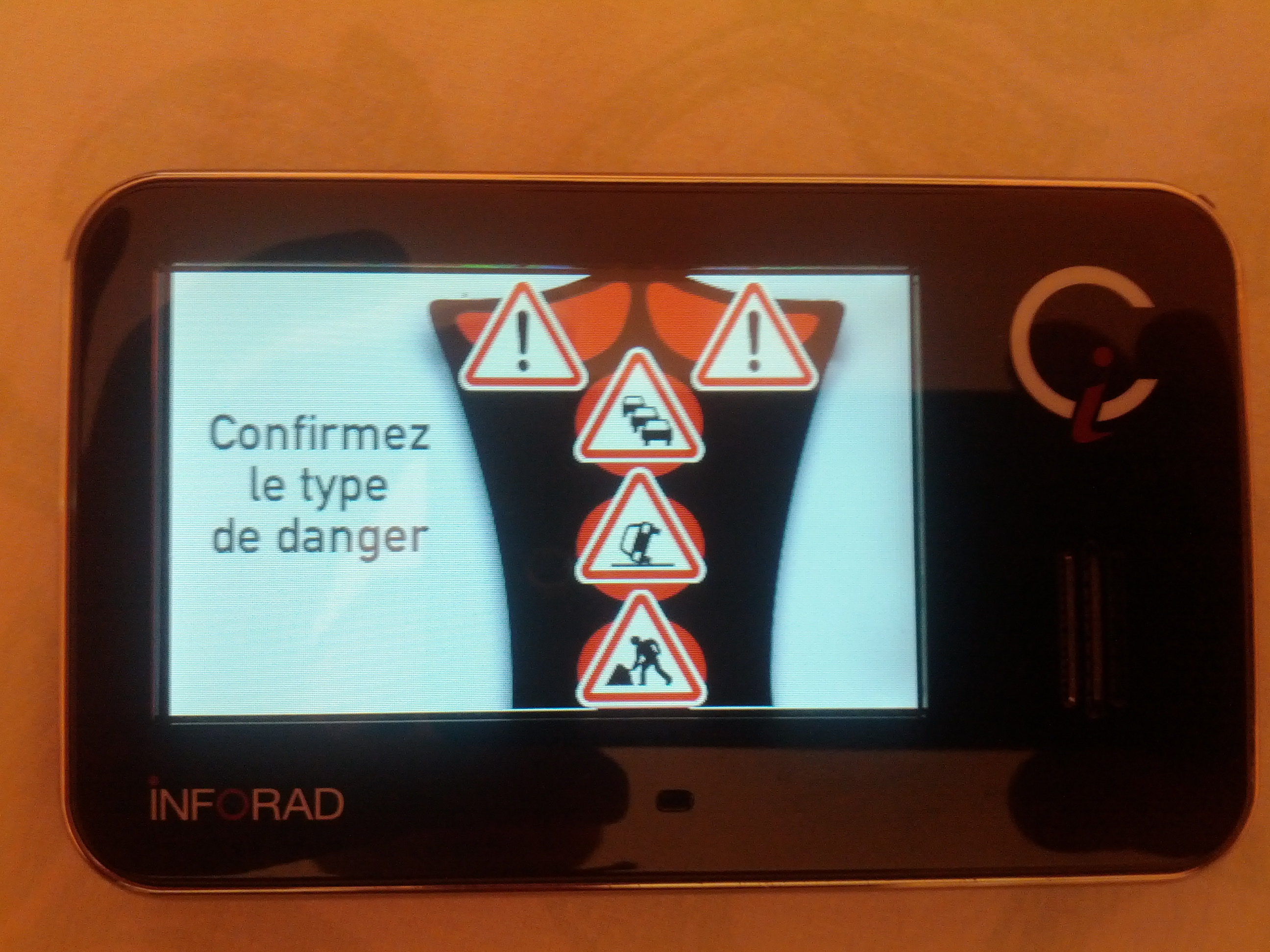 Photo d'un Inforad Ci lors d'une déclaration d'une zone de danger de type radar mobile, bouchon, accident, travaux.